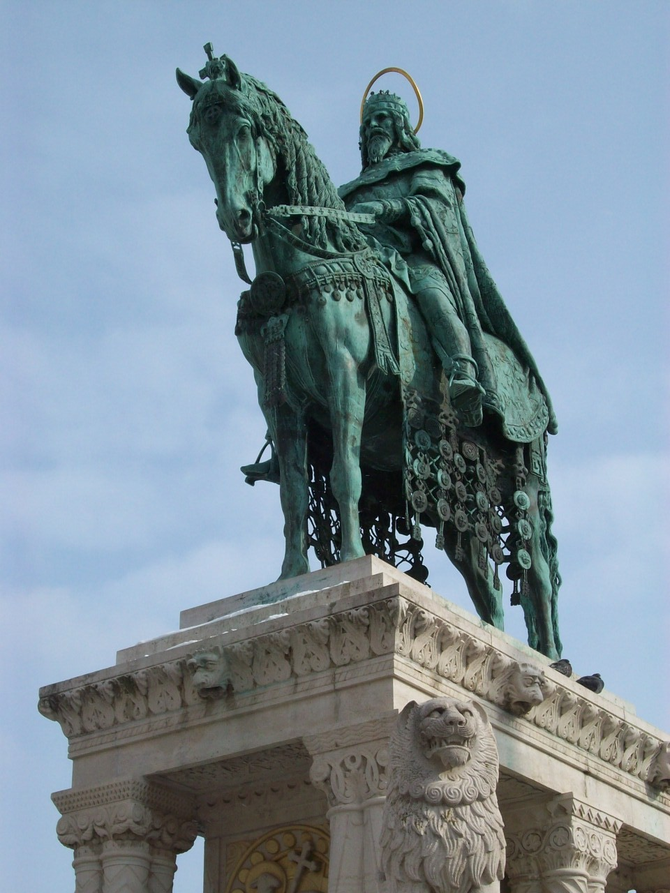 Szent István király szobra a Halászbástyánál